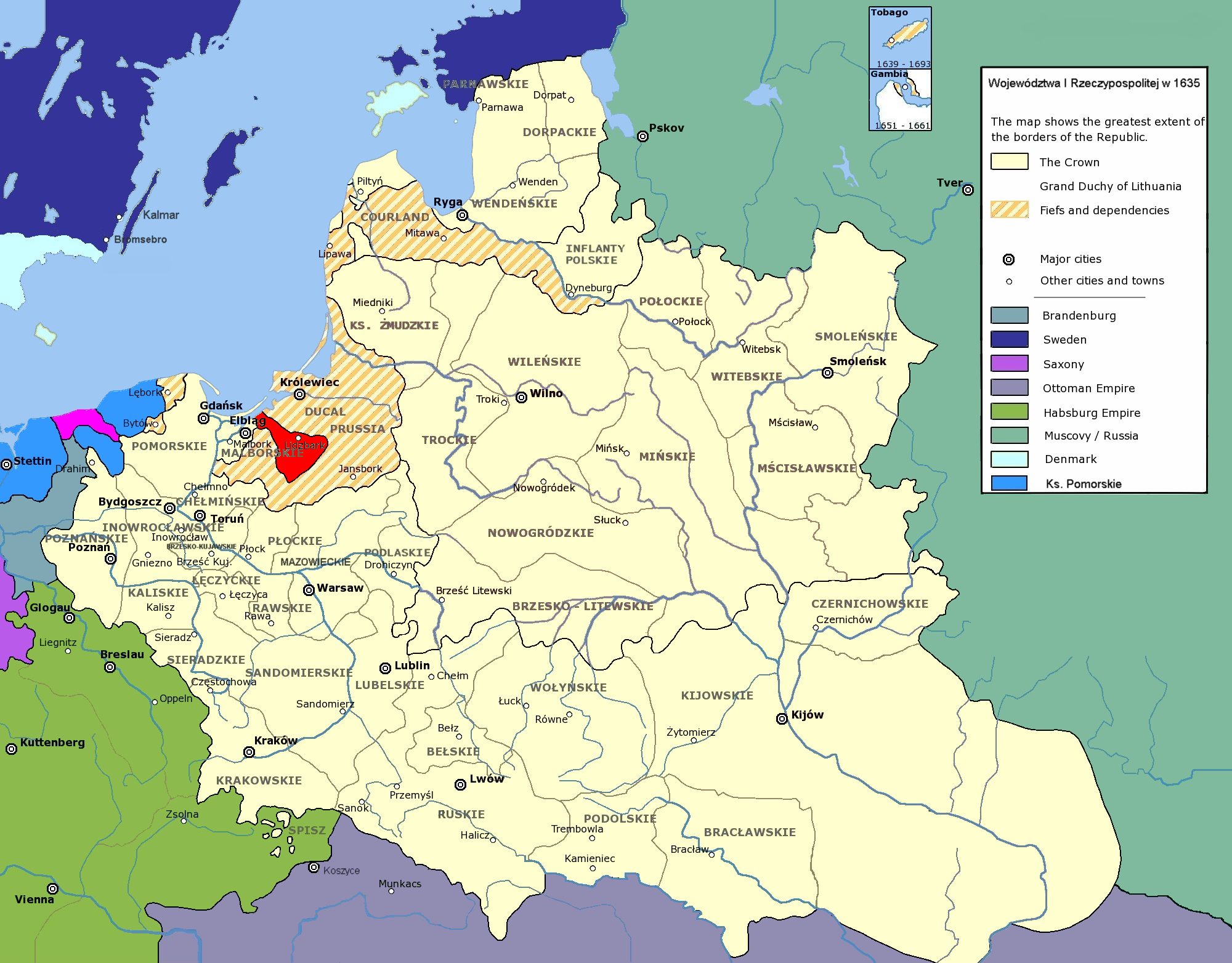 Rzeczpospolita Obojga Narodów w 1635 r.; Księstwo Warmińskie Polish-Lithuanian Commonwealth in 1635; Duchy of Warmia